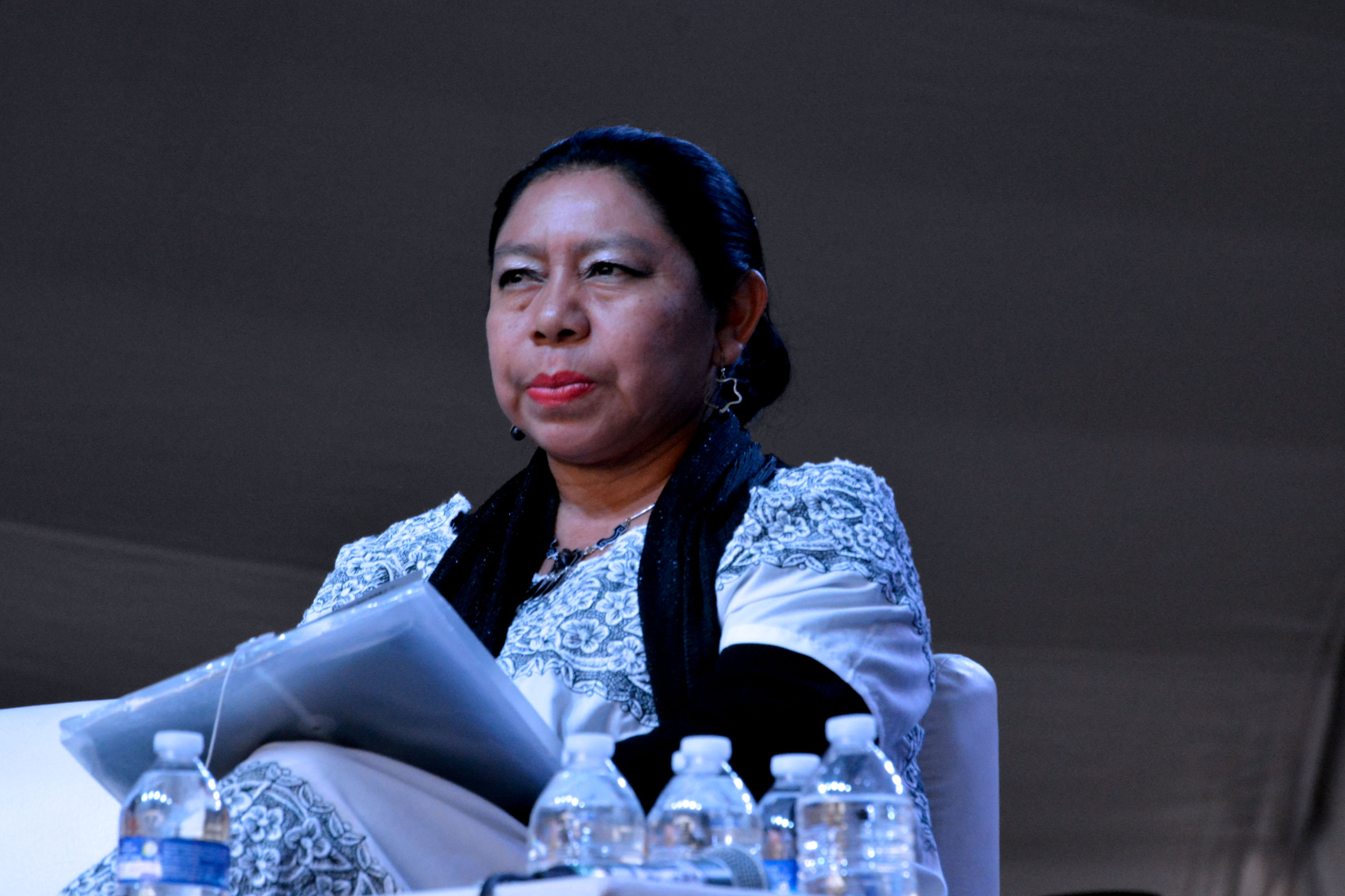 Sábado 09 de septiembre de 2017. En la IV Fiesta de las Culturas Indígenas, Pueblos y Barrios Originarios, en el Escenario Principal, se realizó el Recital de poesía indígena VI, con la participación de Feliciano Sánchez Chan, peota maya; Isaac Esaú Carrillo, poeta maya y Briceida Cuevas Cob, poeta maya. Mariano Castillo / Secretaría de Cultura CDMX.